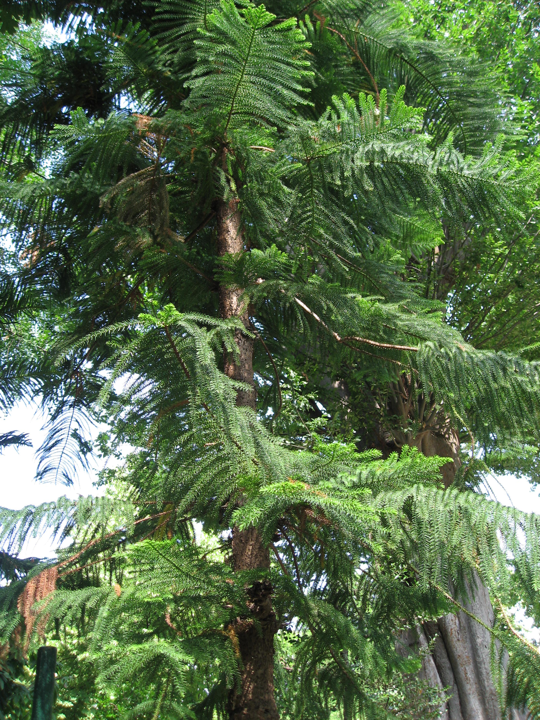 Araucaria columnaris in Giardino dei Semplici di Firenze Map: 43° 46' 45" N 11° 15' 39" E